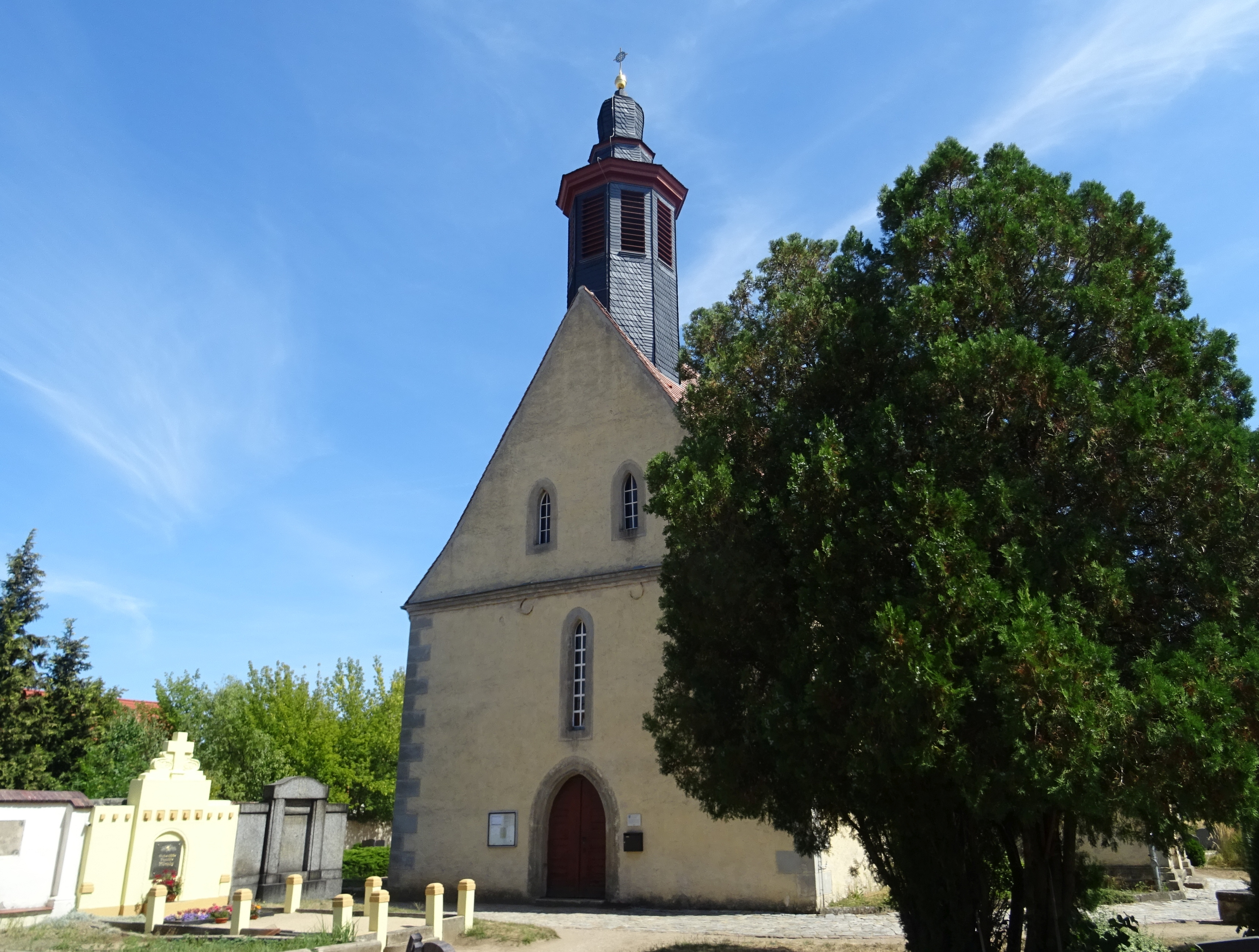 Mühlberg/Elbe, denkmalgeschützte Friedhofskapelle